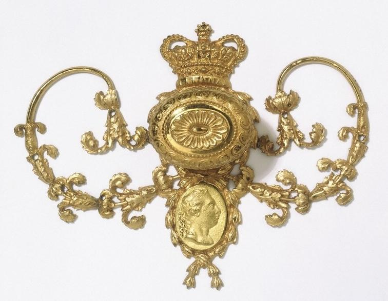 ידית דלת מבית סומרסט שעוצבה על ידי ויליאם צ'יימברס ומוצגת במוזיאון ויקטוריה ואלברט (מספר קטלוגי 4013-1855)